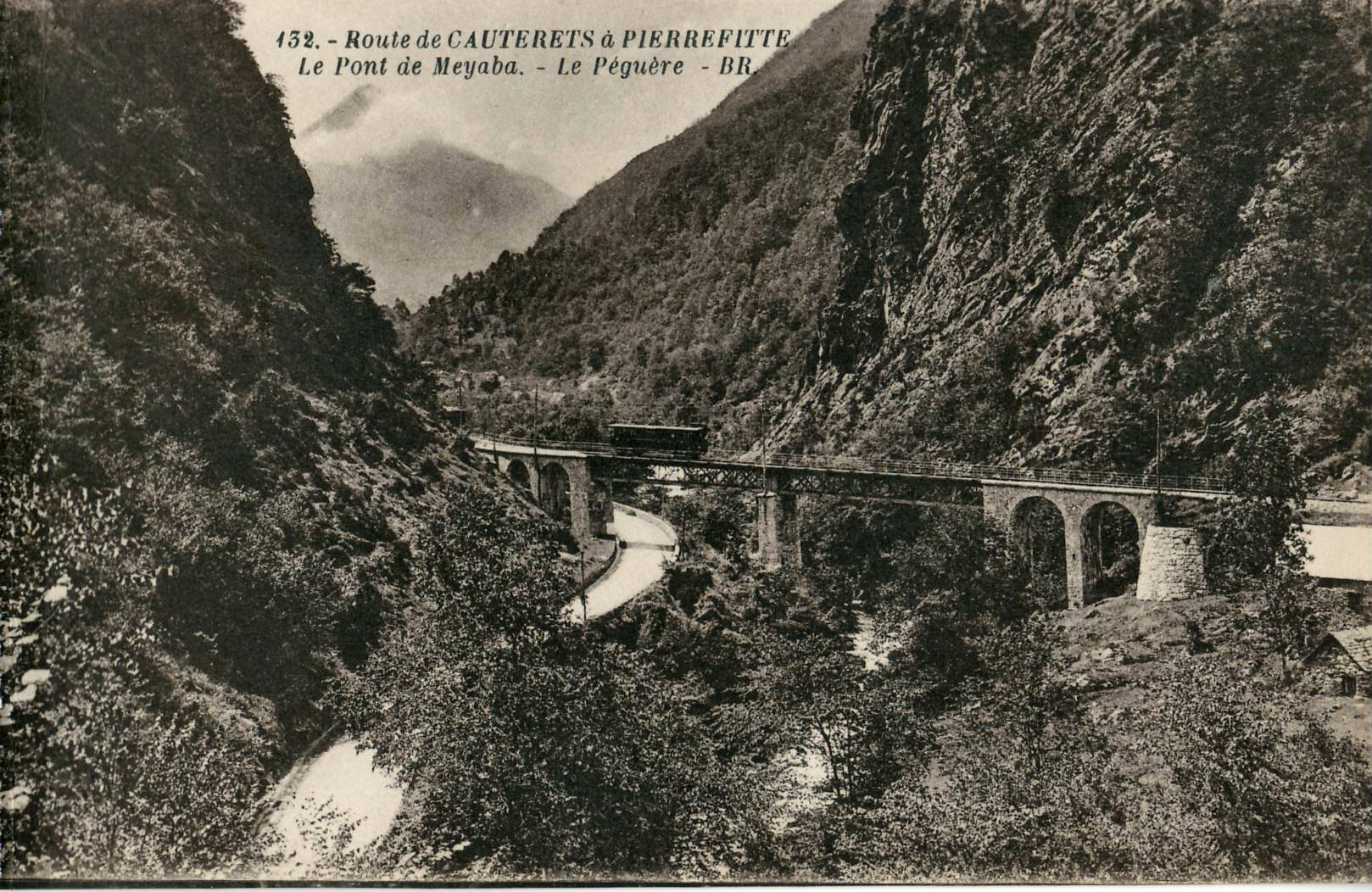 Carte postale ancienne éditée par Bloc Frères, n°132 : Route de CAUTERETS à PIERREFITTE - Le Pont de Mebaya - Le Péguère